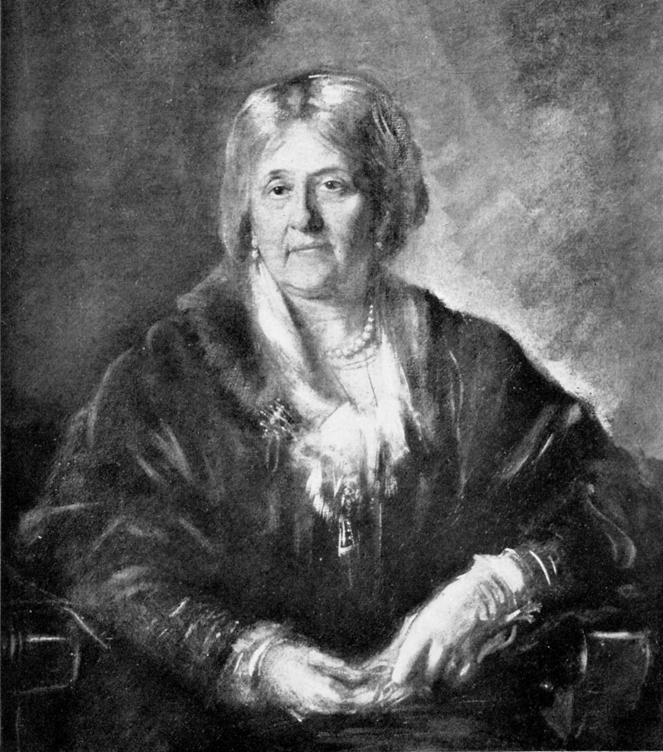 Ölgemälde (Ausschnitt) von Josephine von Wertheimstein (1820–1894), Schwester des österreichischen Philologen Theodor Gomperz